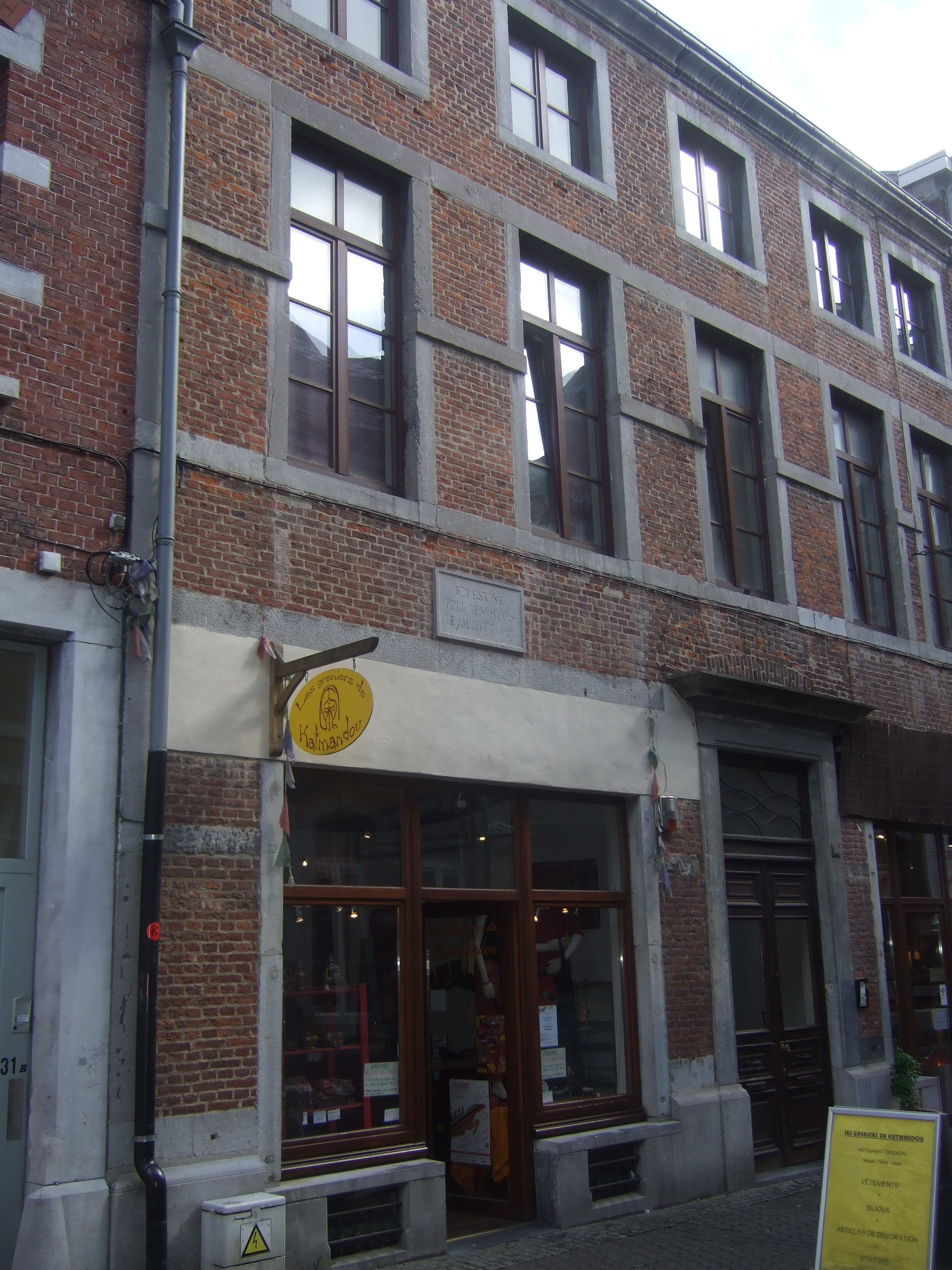 Photo de la façade de la maison natale de Félicien Rops à Namur (rue du Président, 33). Photo personnelle.